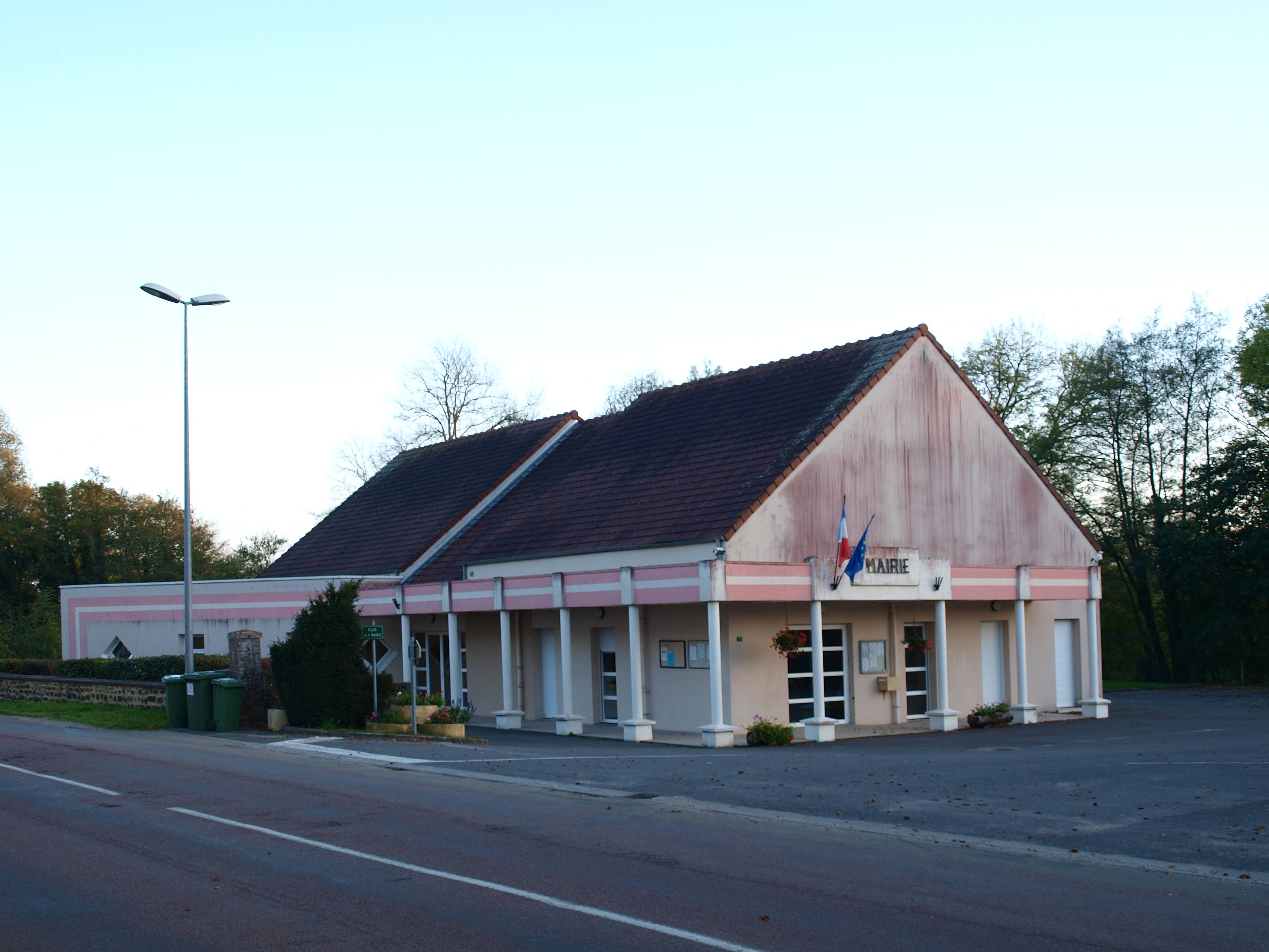 Moulins-sur-Ouanne (Yonne, France), la mairie.